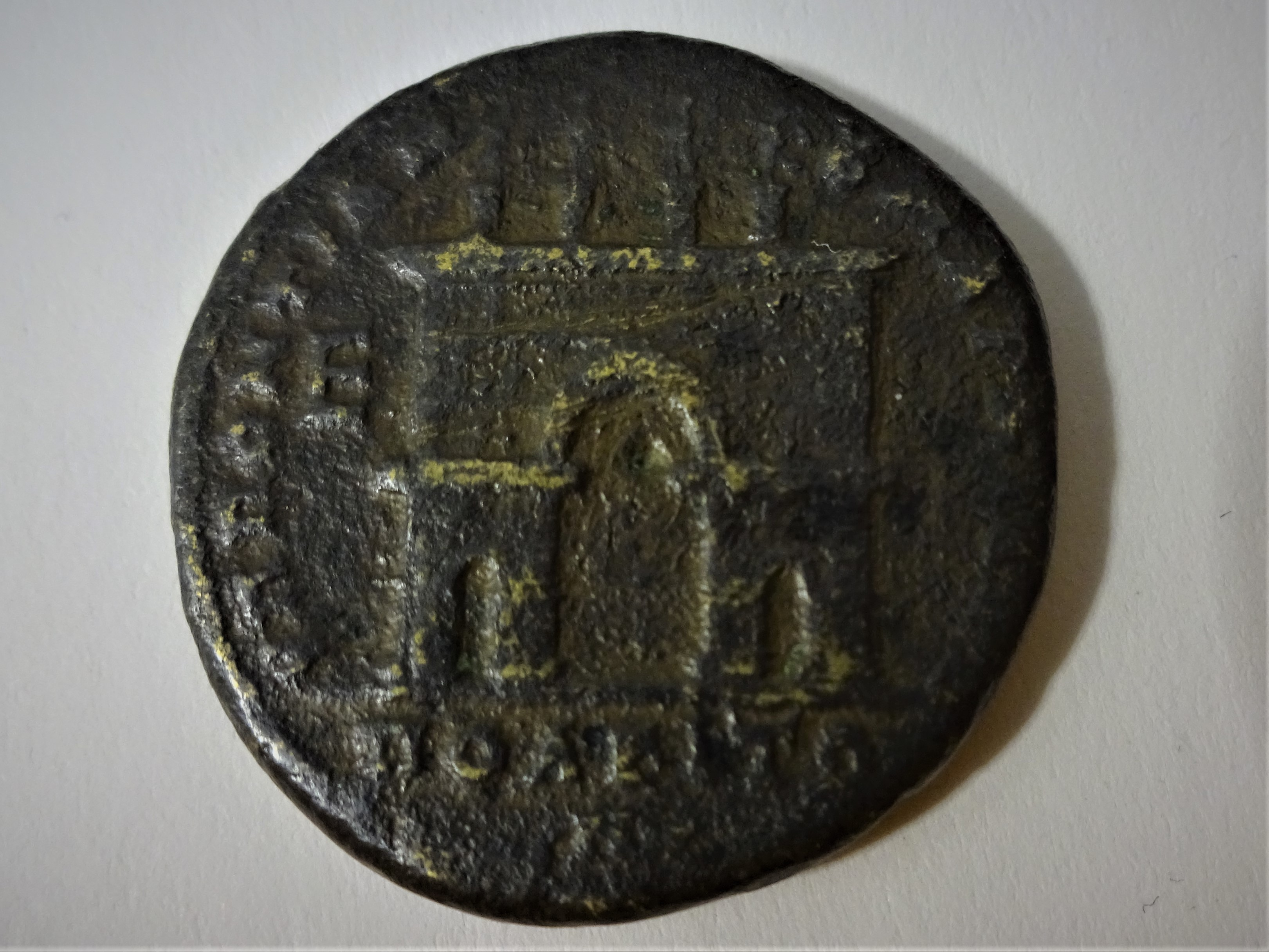 Stadttor von Marcianopolis auf Bronzemünze z.Zt. Macrinus' und Diadumenianus', Price and Trell page 51, fig.85